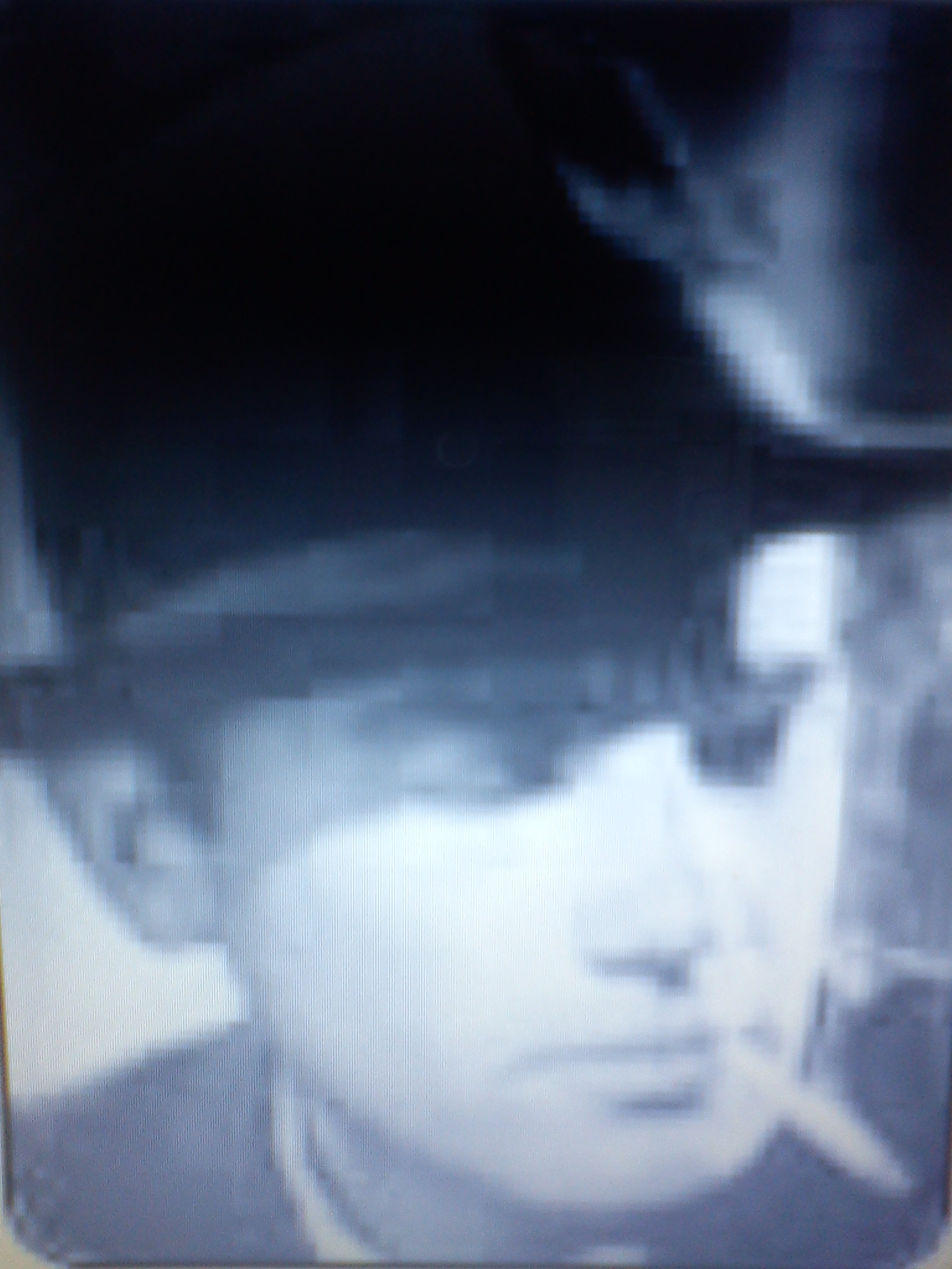 Mario Passano- Actor y cantante de Tango